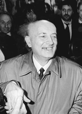 ADN-ZB Gahlbeck 18.3.1990 Leipzig: Wahl 90 Im Wahl-Party-Zelt der CDU wurde der Parteivorsitzende Hans Wilhelm Ebeling von Anhänger und der internationalen Presse in Empfang genommen.